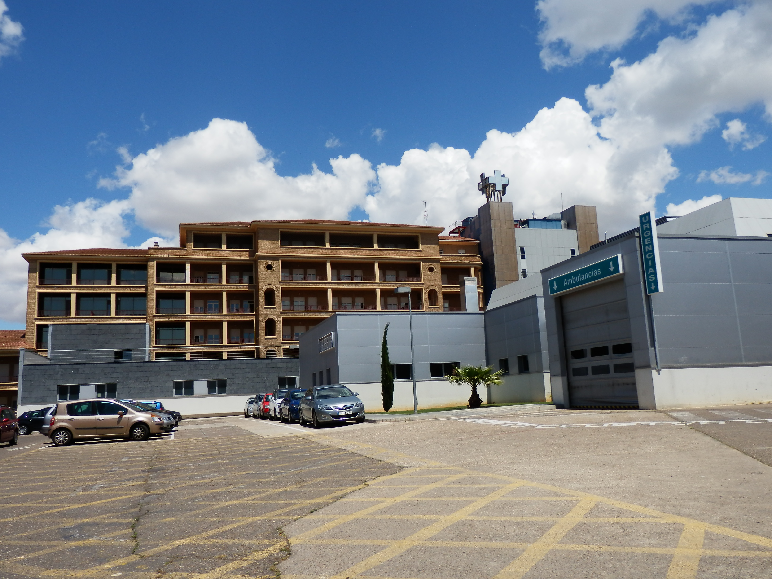 Hospital Royo Villanova en Zaragoza.